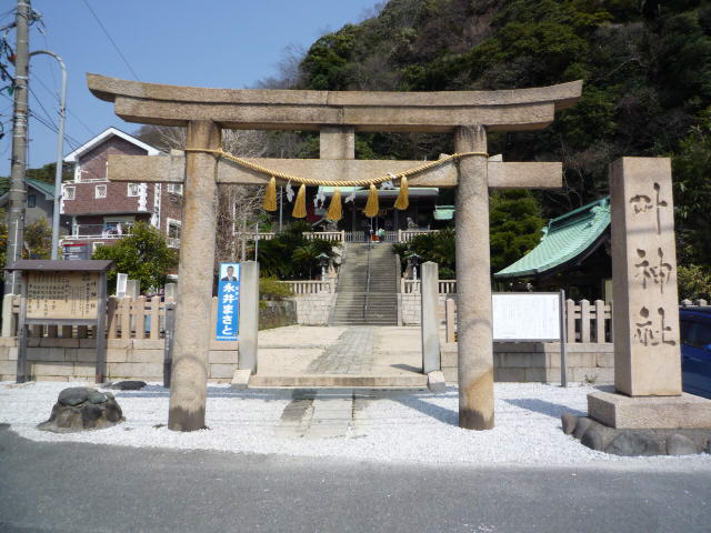 東叶神社を正面から撮影